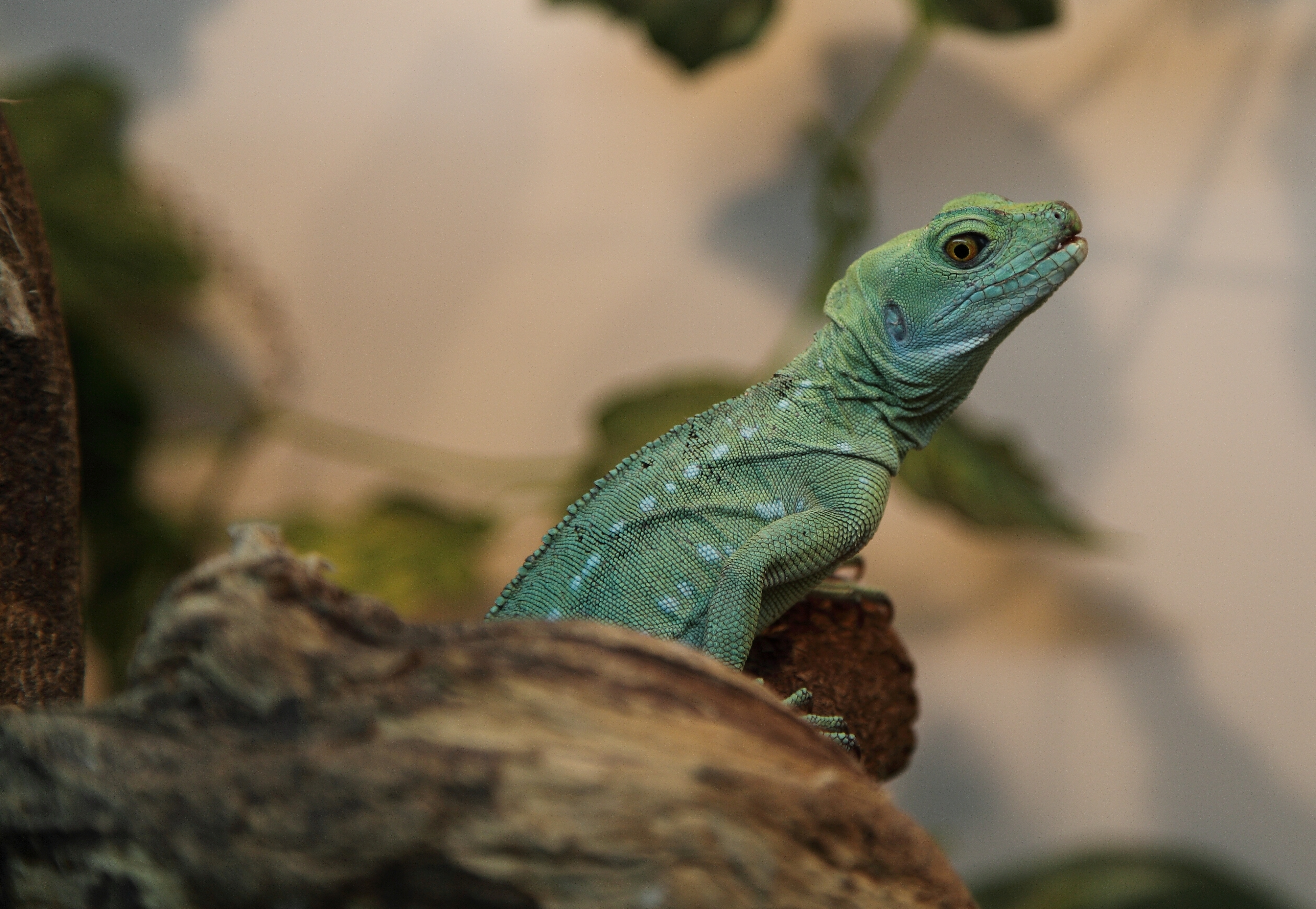 Выставка «Монстры тропиков» в ЦКиОМ Северодвинска (25 февраля 2012 года).